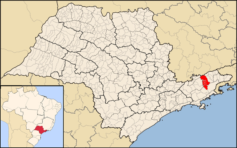 Mappa dell'arcidiocesi cattolica di Aparecida, nello stato di San Paolo, Brasile. Fonte per i confini dell'arcidiocesi